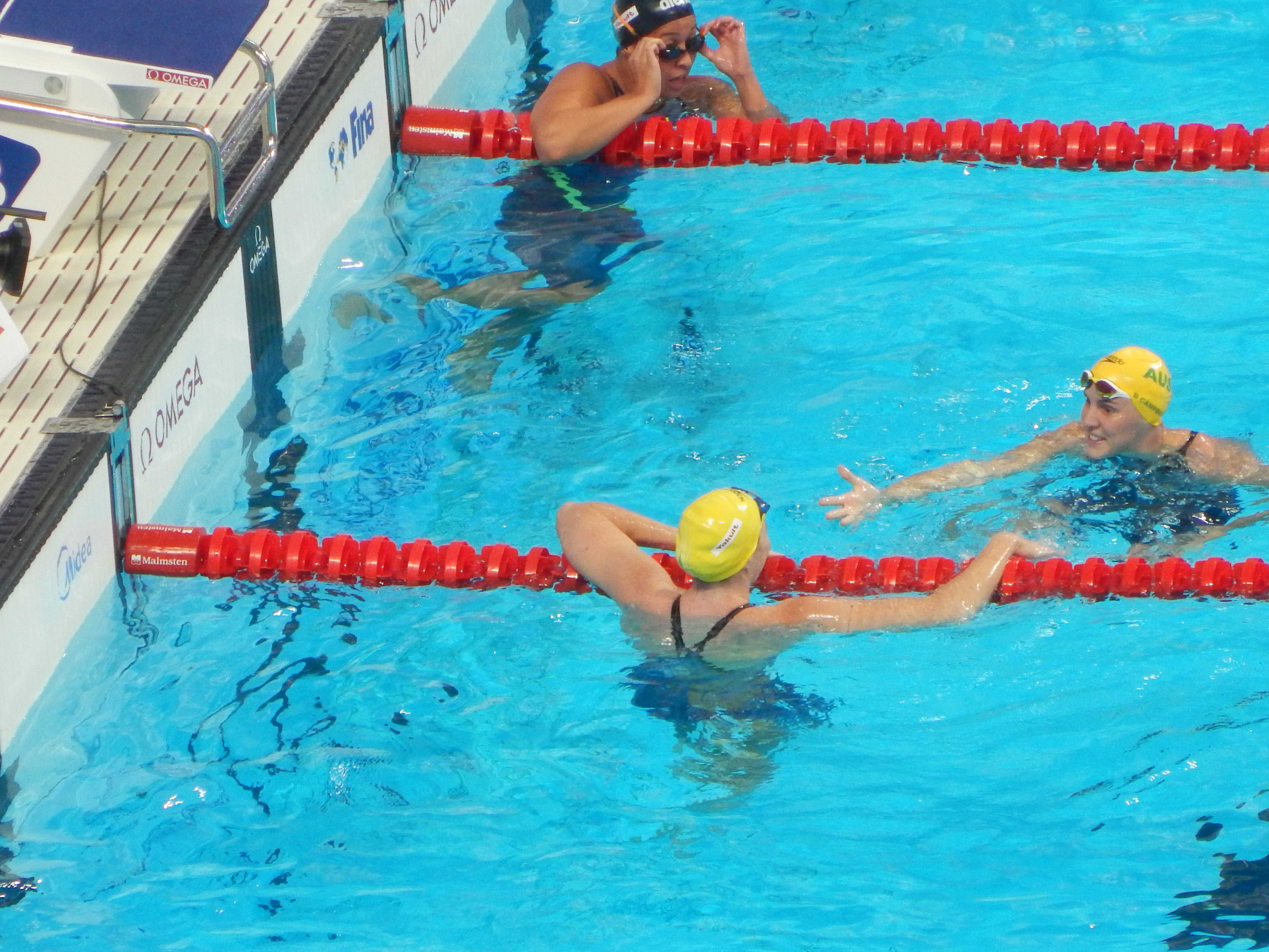 Сёстры Кэмпбелл после триумфального для них финала на 100 метров в/с в Казани